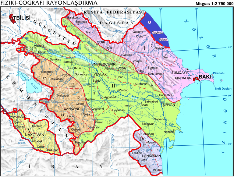 Samur-Şabran fiziki-coğrafi rayonu